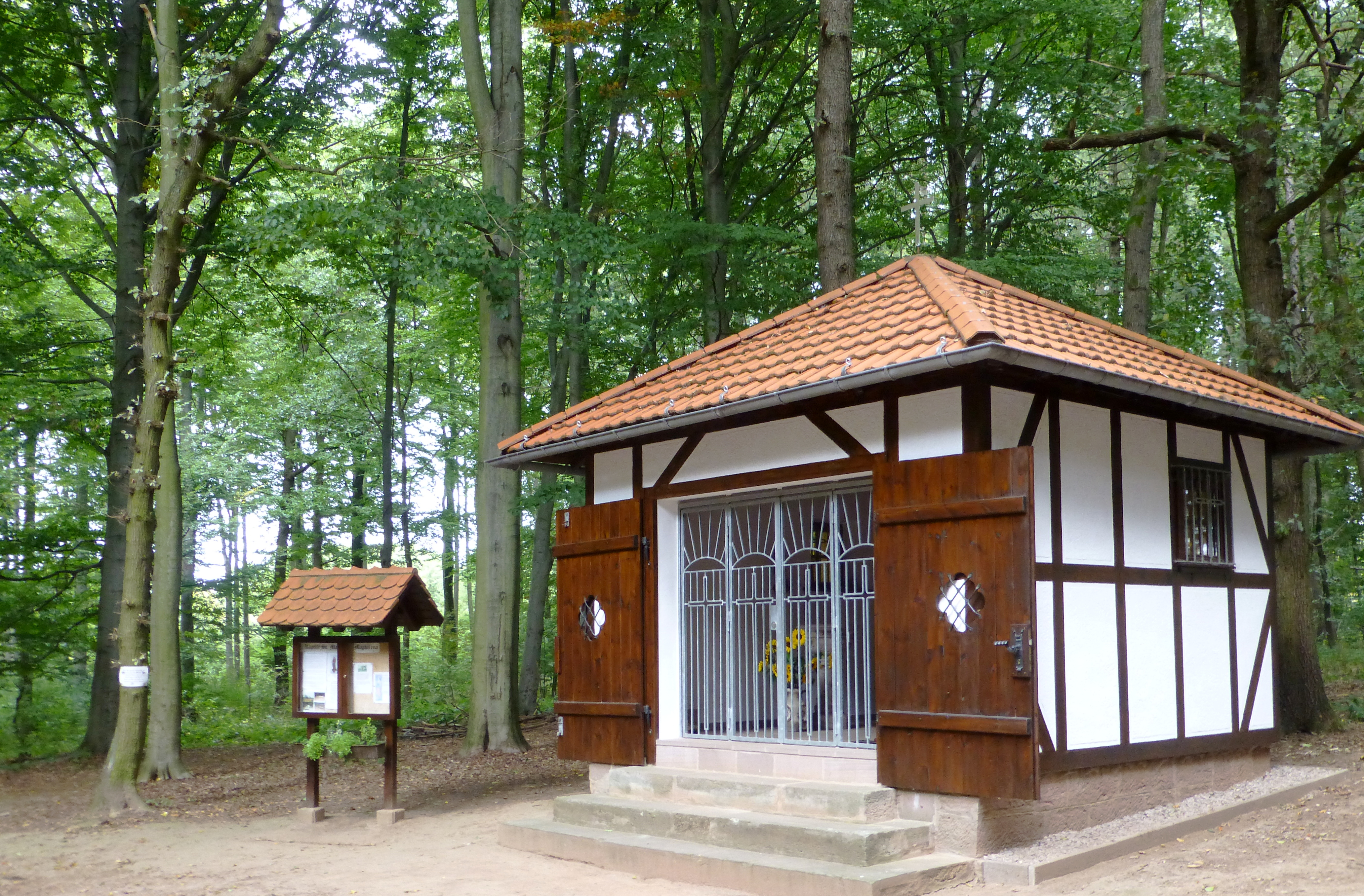 Kapelle St. Maria Magdalena nordöstlich von Kirchgandern, Landkreis Eichsfeld. Zielpunkt eines Kreuzwegs von Kirchgandern aus. Vorgängerbau errichtet 1852 zum Dank für die Verschonung von einer Choleraepidemie, 1928 restauriert, nach 1952 zerstört (Lage in unmittelbarer Nähe zur ehemaligen innerdeustchen Grenze), 1991 wiedererrichtet.